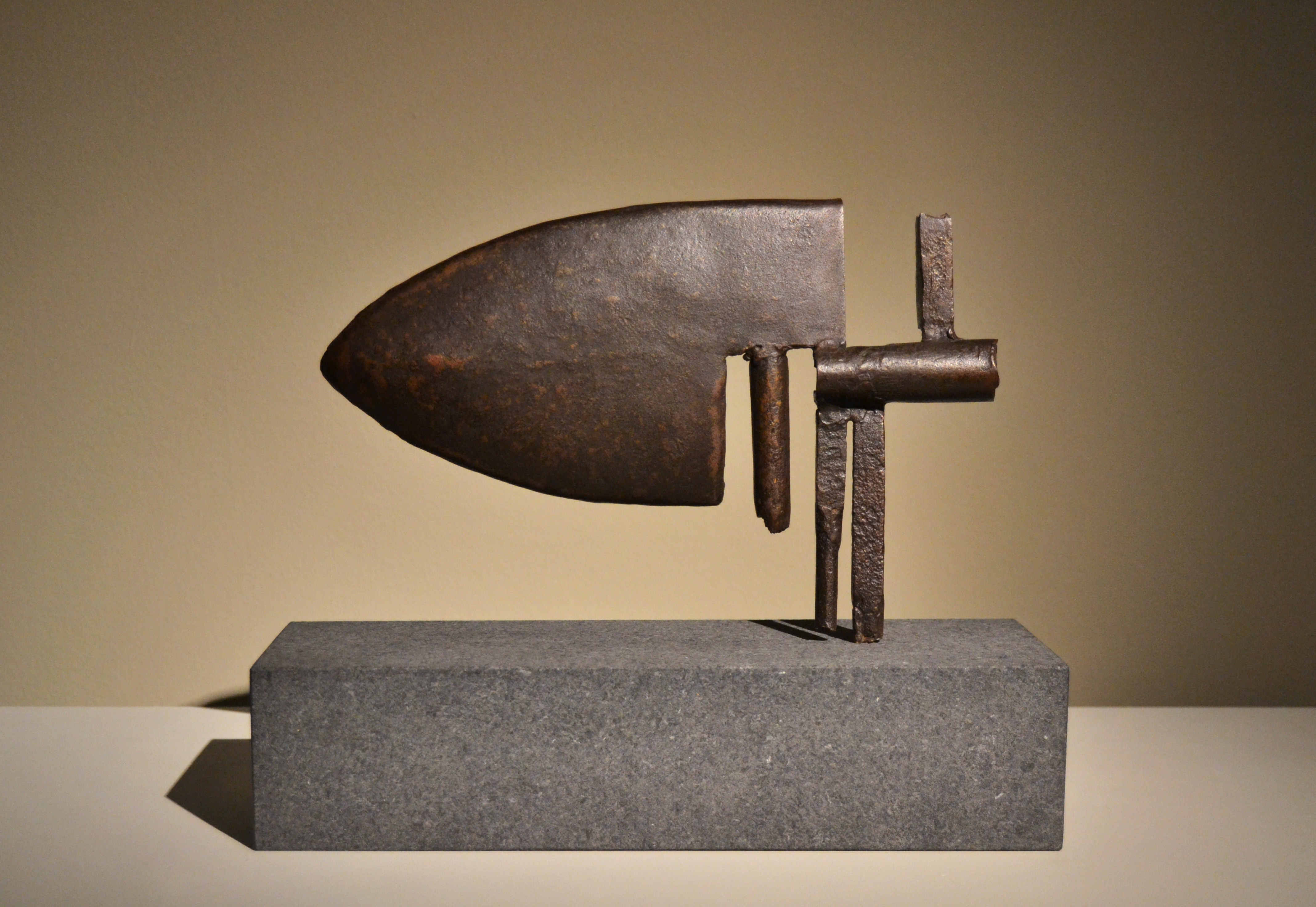 Mà gitada (Main couchée), Julio González. Ca. 1937, ferro forjat, tallat i soldat, 19 x 29,5 x 2,7 cm. Institut Valencià d'Art Modern.